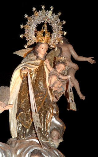 Procesión de la Virgen del Carmen, Patrona de Beniaján (Murcia), España.